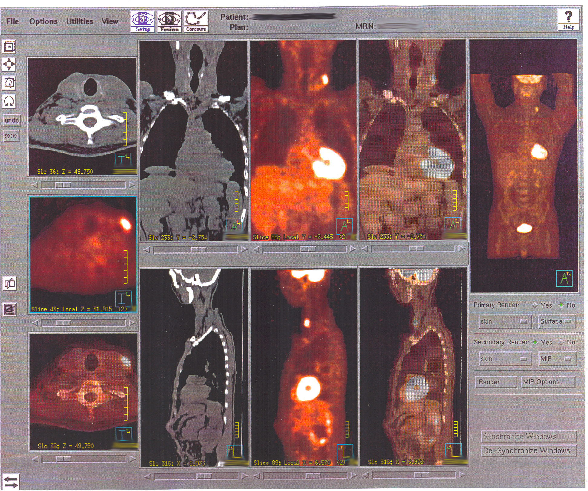 Image pathologie révélant une métastase ganglionnaire issue de la tomographie à émission de positon (application en oncologie).